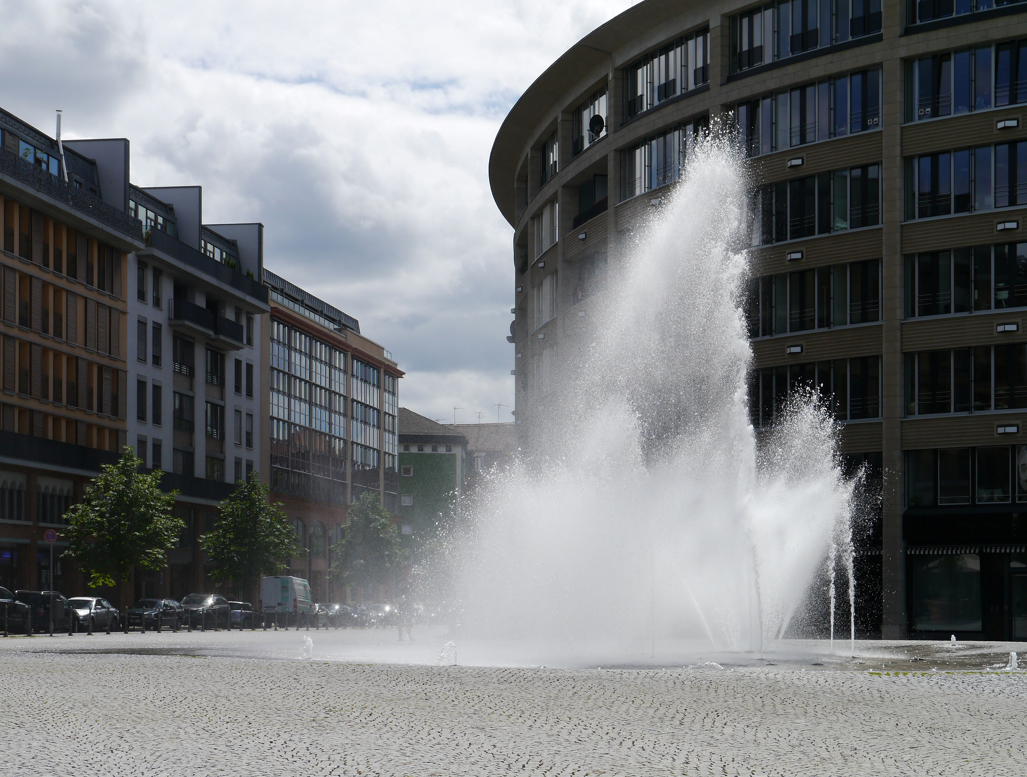 Windbö gestaltet die Fontäne am Walther-von-Cronberg-Platz in Frankfurt-Sachsenhausen.